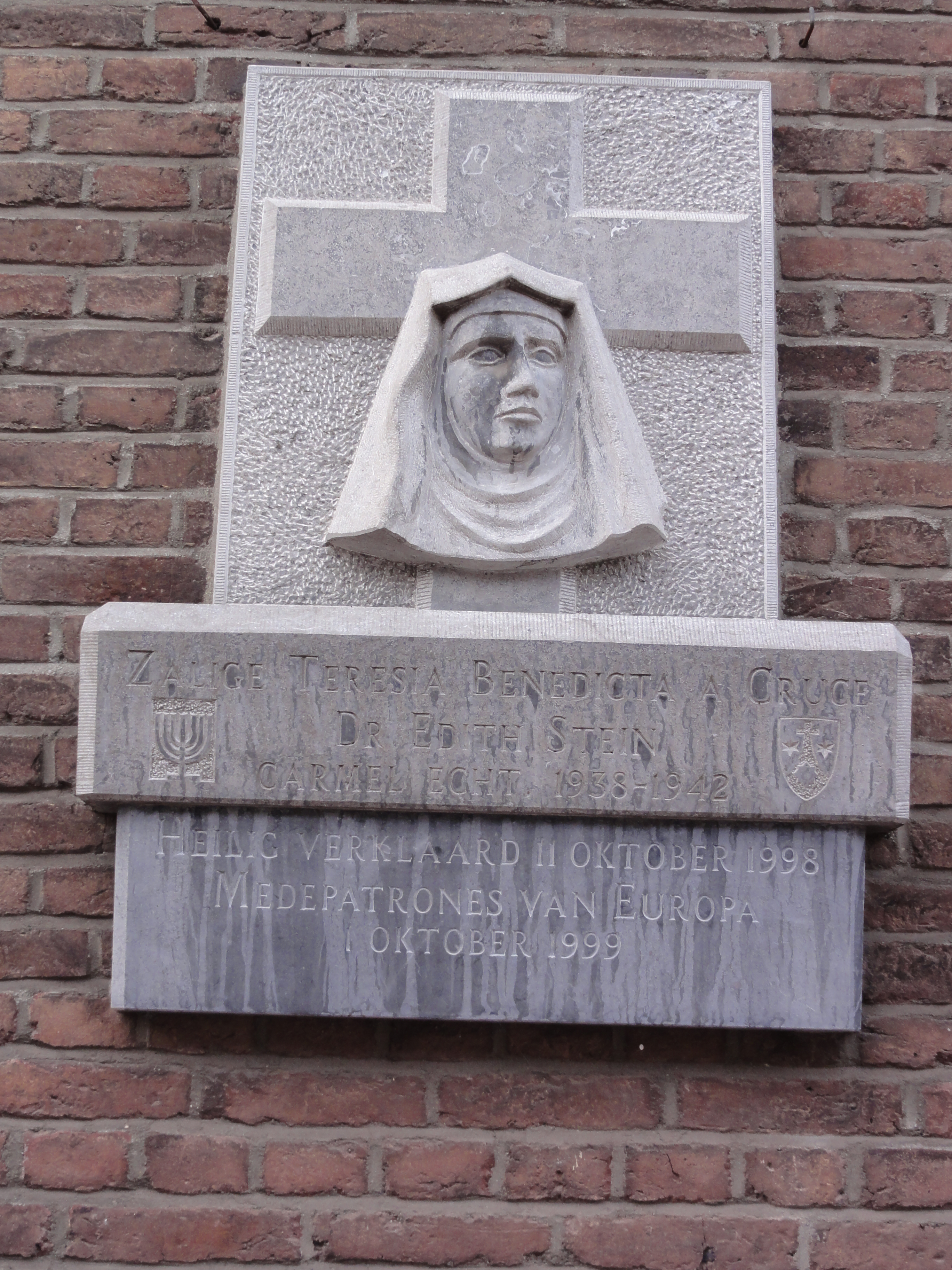 Echt (Limburg)